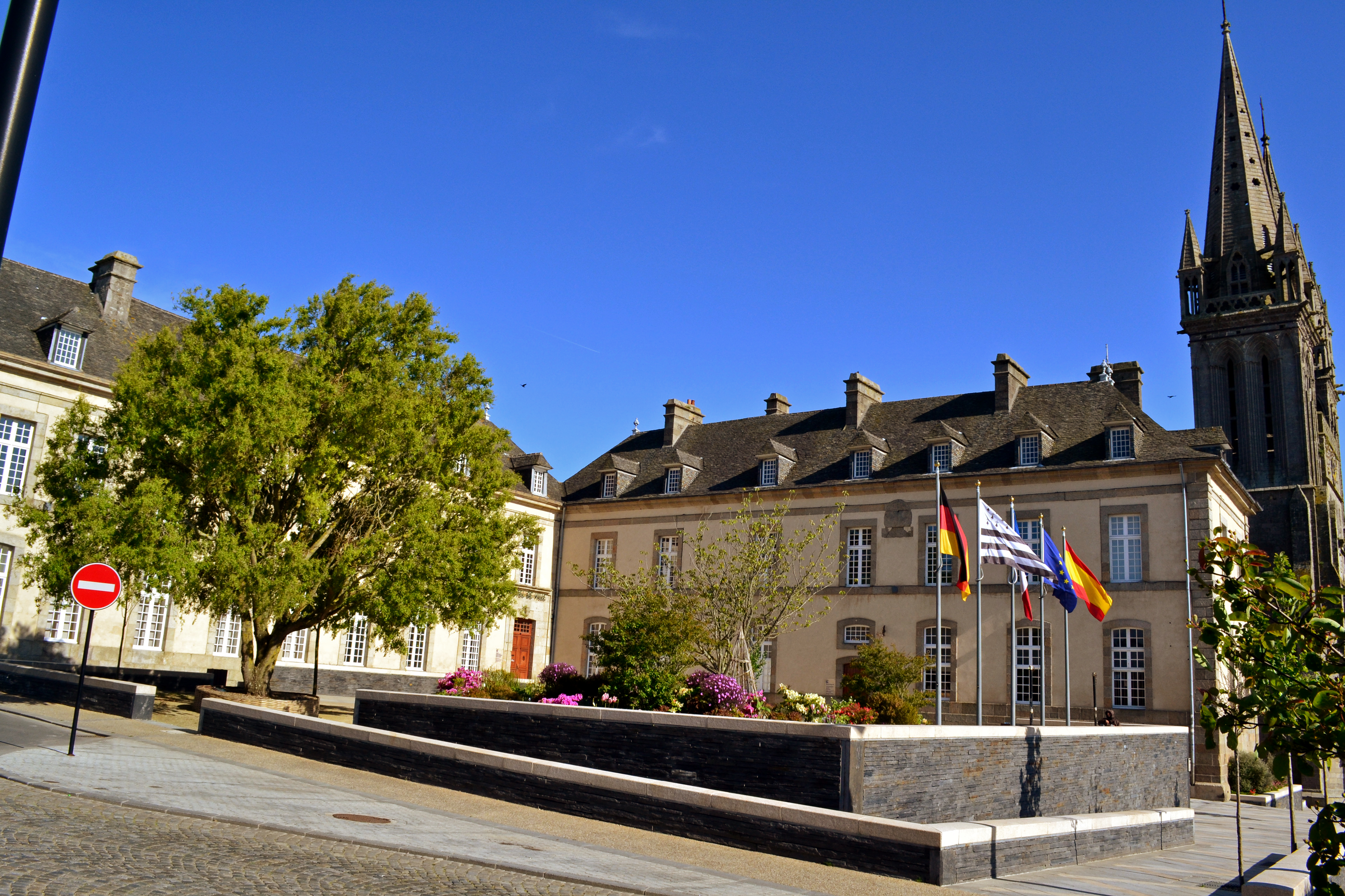 Hôtel de ville de Saint-Pol-de-Léon (Finistère).